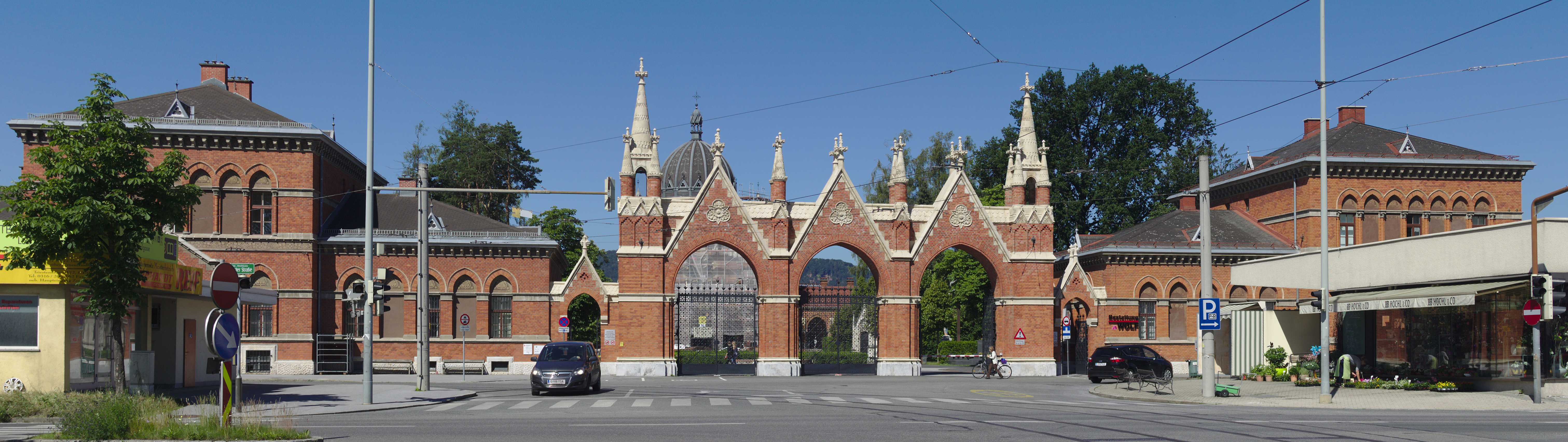 Zentralfriedhof Graz